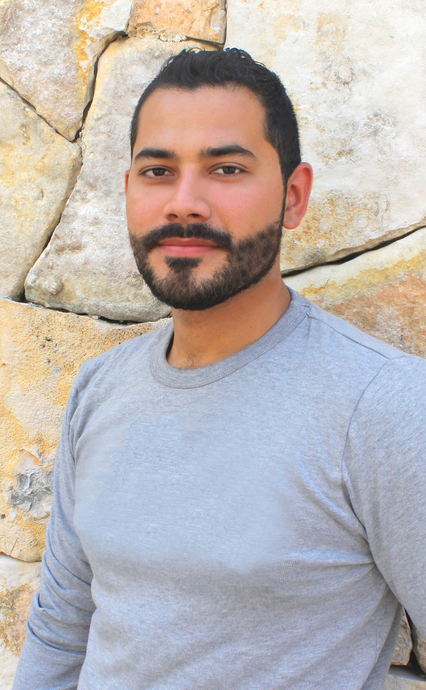 Cantautor Asaid previo a Rueda de Prensa en 2015 México, D. F.